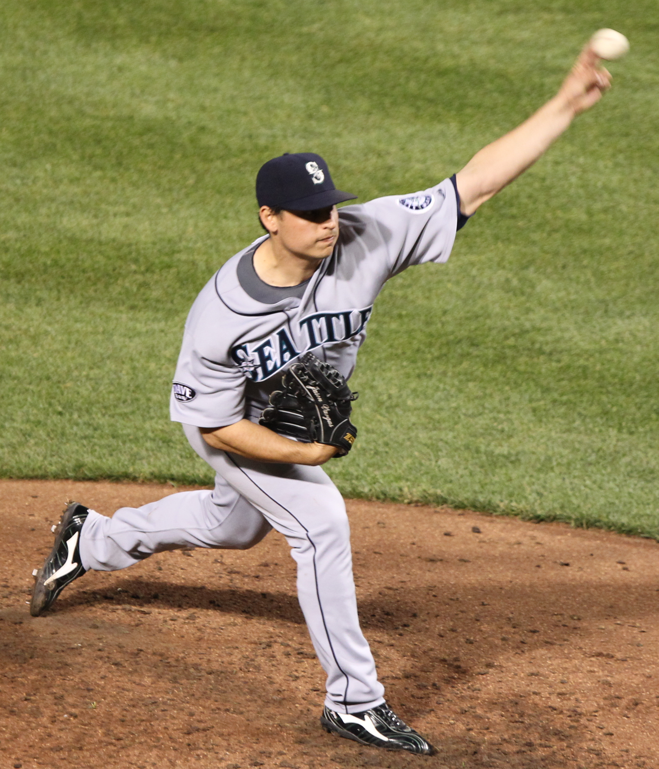 Jason Vargas